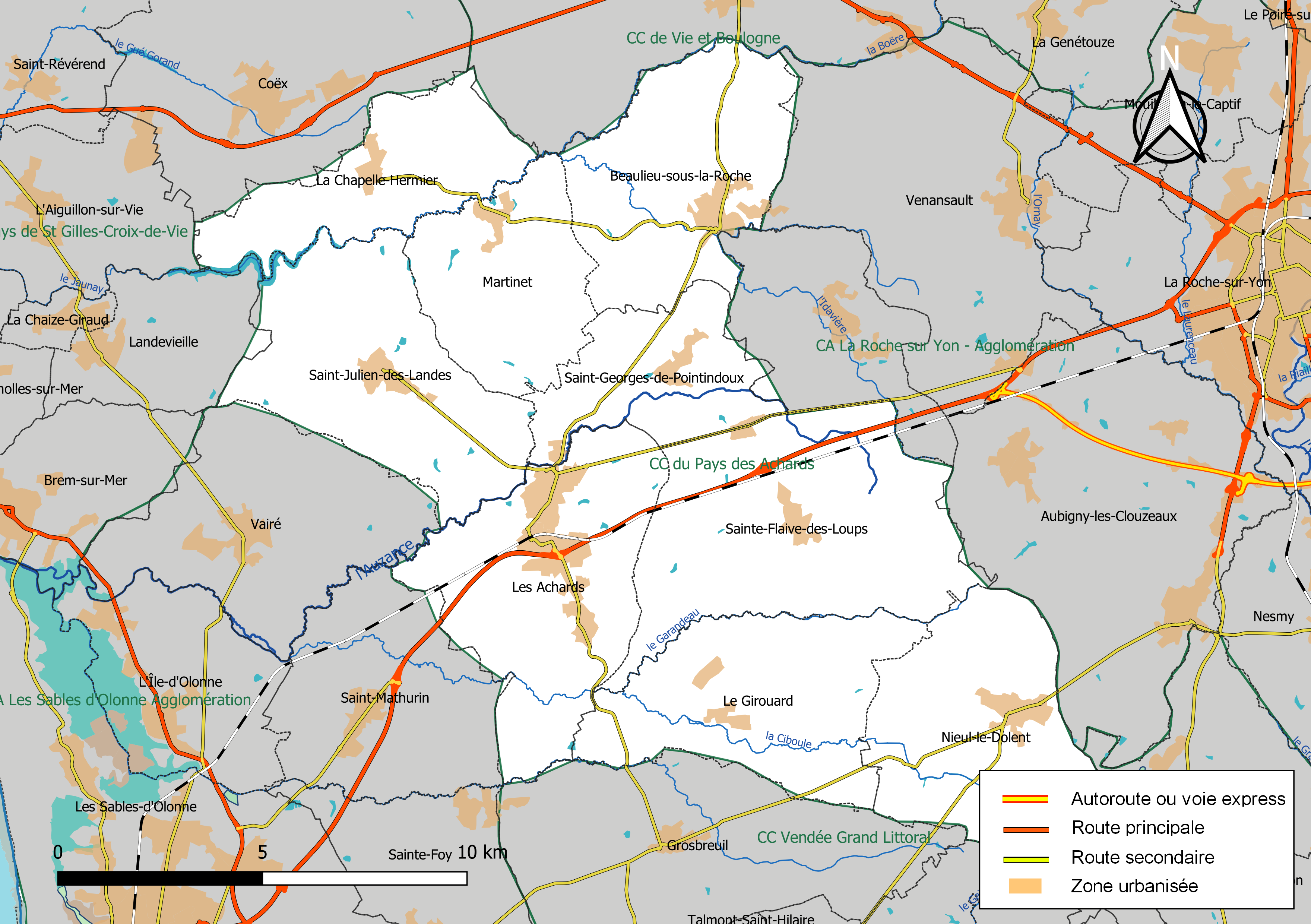 Carte géographique de la Communauté de communes du Pays des Achards, département de la Vendée, France. Composition au 1er janvier 2019.